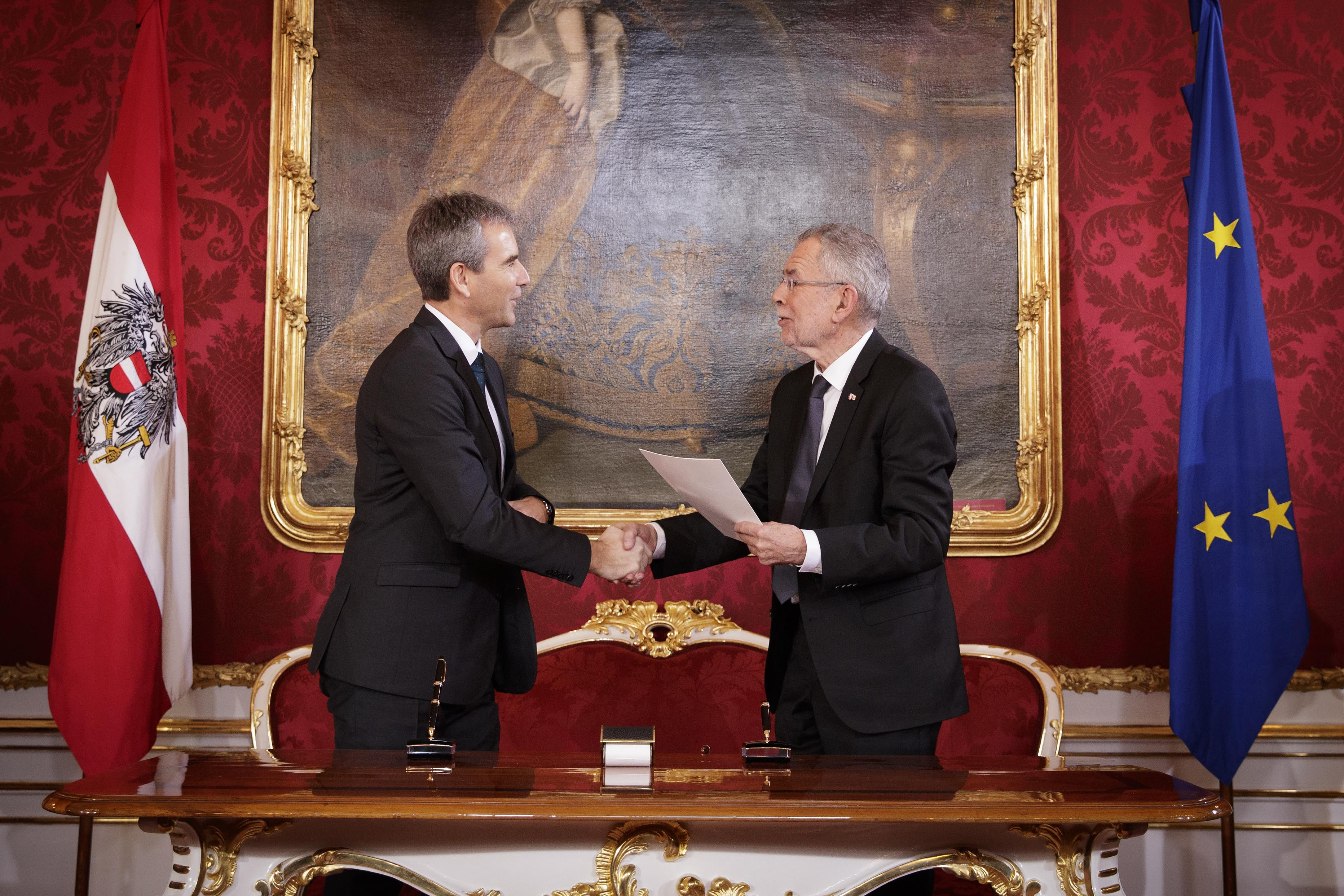 Ernennung und Angelobung der neuen Bundesregierung und der neuen Staatssekretäre im Maria Theresien-Zimmer durch Bundespräsident Alexander Van der Bellen am 18 12 2017. Fotocredit: Peter Lechner/HBF